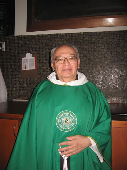 Fotografía de Gustavo Gutiérrez Merino, teólogo peruano de reconocimiento mundial